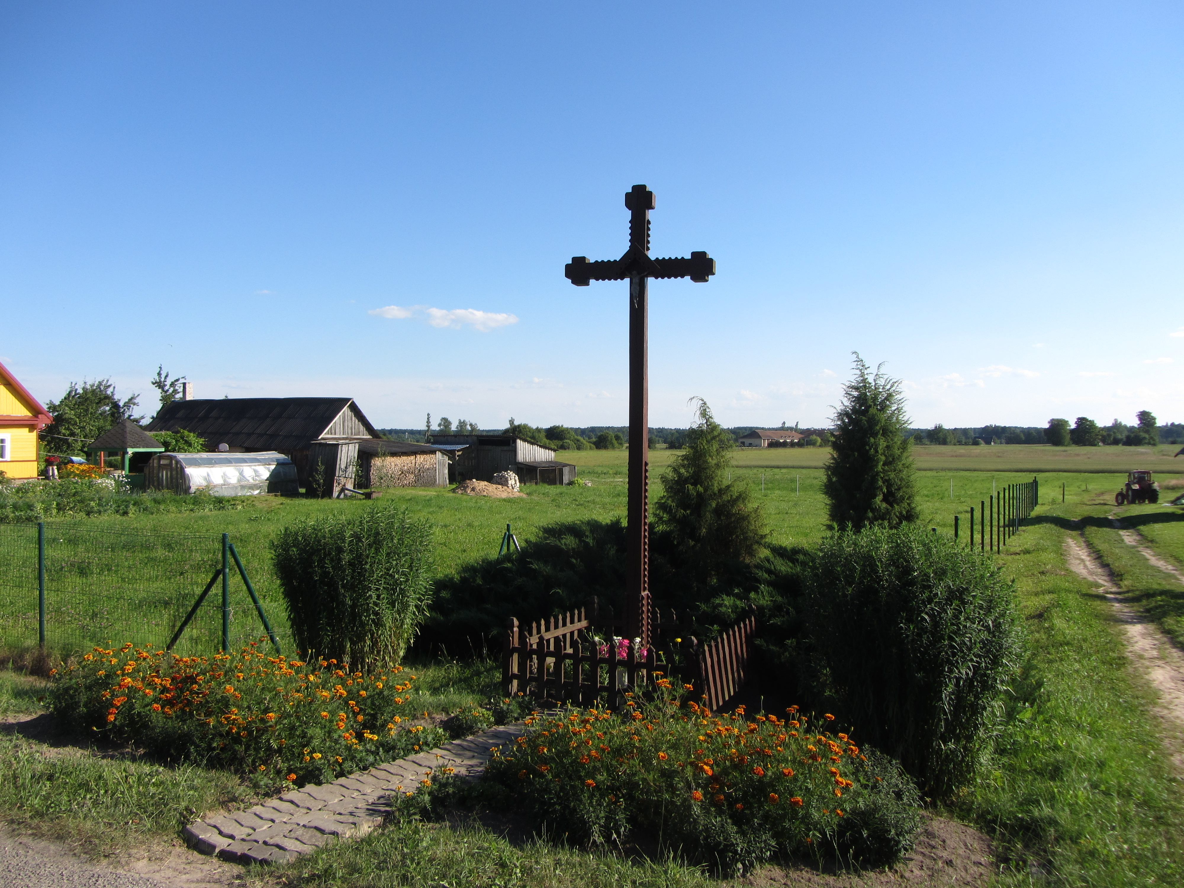 Motiejūnai 19128, Lithuania